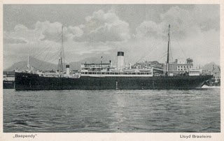 Cartão postal do Lloyd Brasileiro (Loide Brasileiro)o qual retrata o vapor Baependy, torpedeado no litoral do Nordeste Brasileiro a 15 de agosto de 1942.